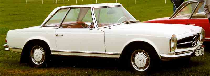 Mercedes-Benz 280 SL 1969